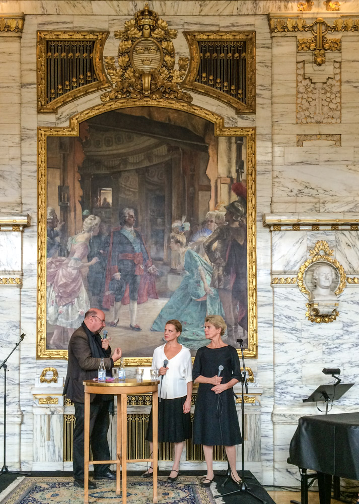 Magnus Lindman, Ylva och Stina Ekblad under Öppet Hus på Dramaten den 19 september 2015.